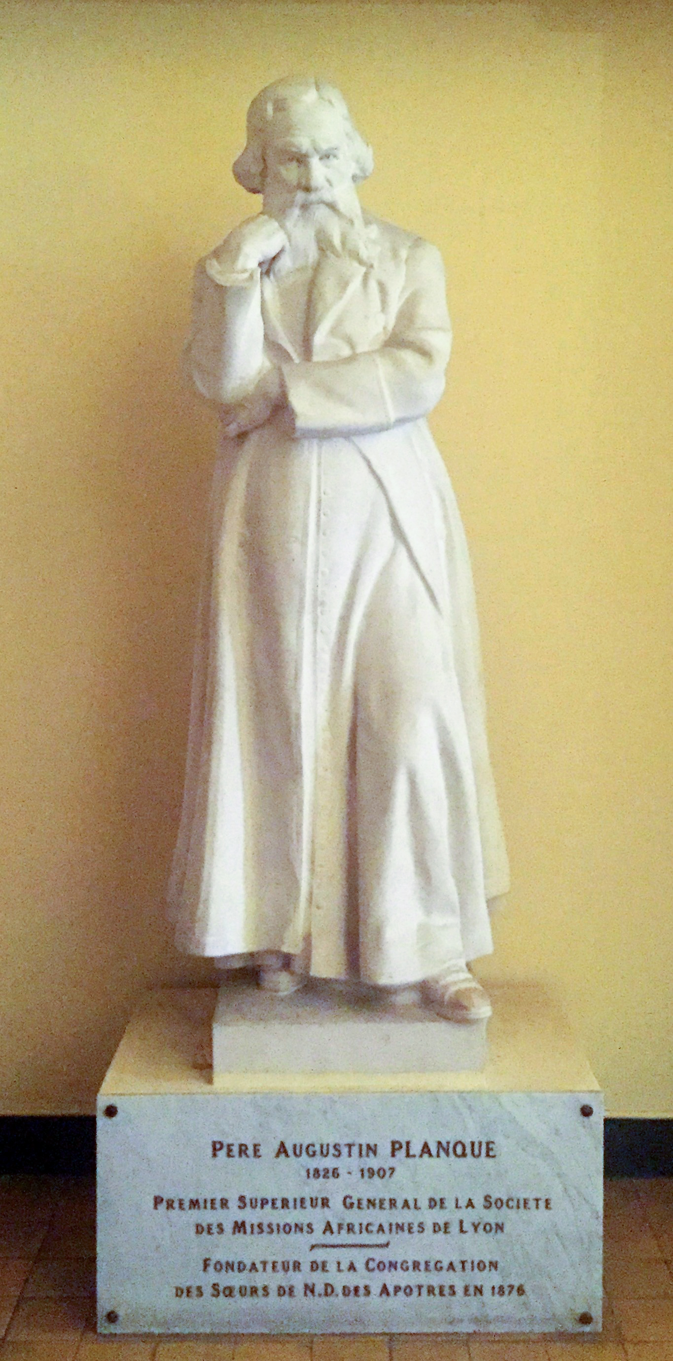 Musée africain de Lyon - statue d'Augustin Planque